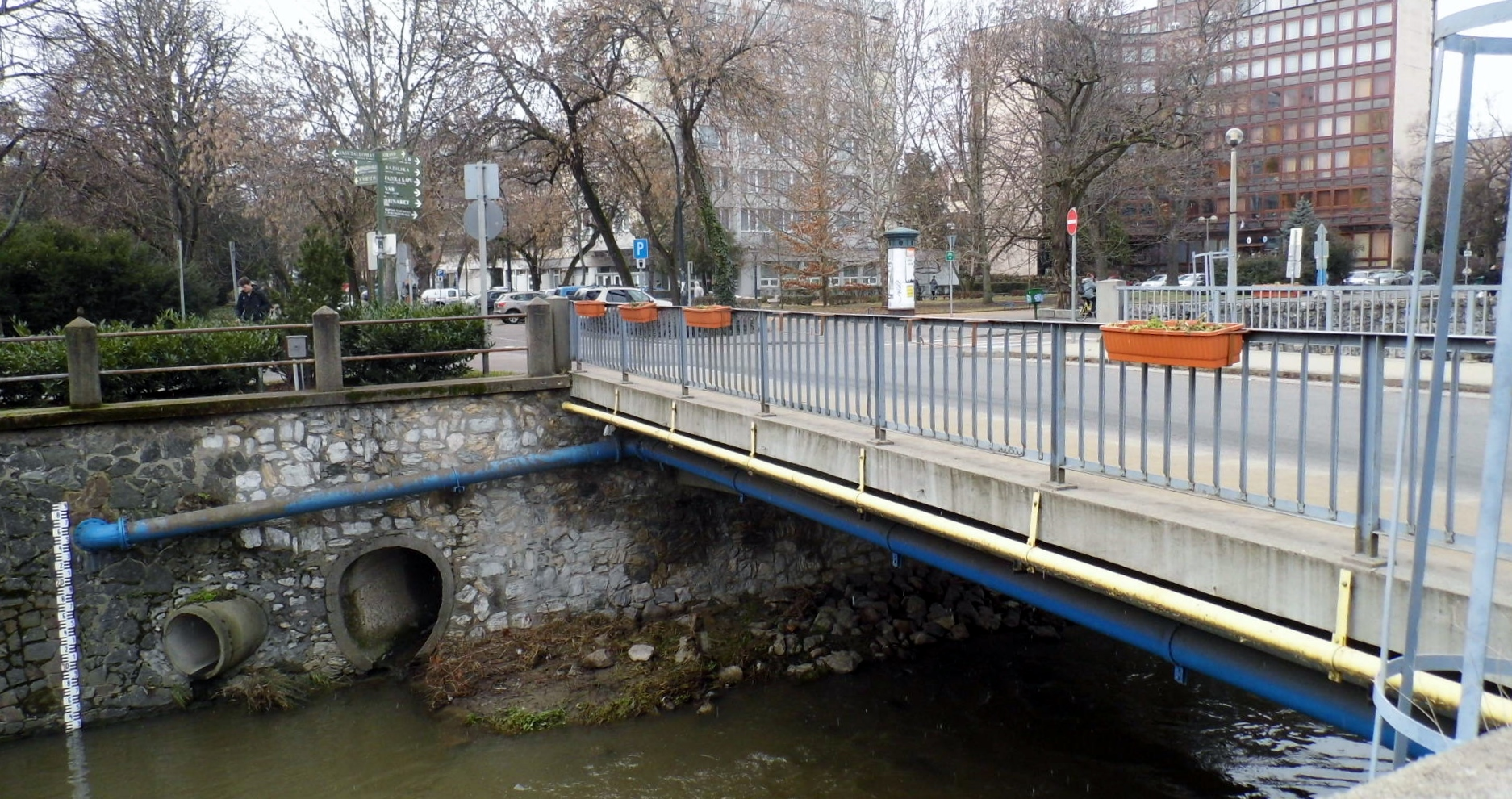 A Klapka utcai híd Egerben